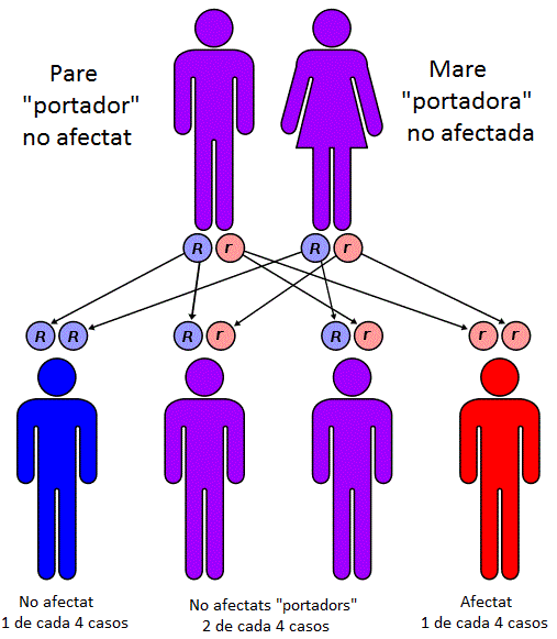 Patró d'herència dels gens autosòmics recessius